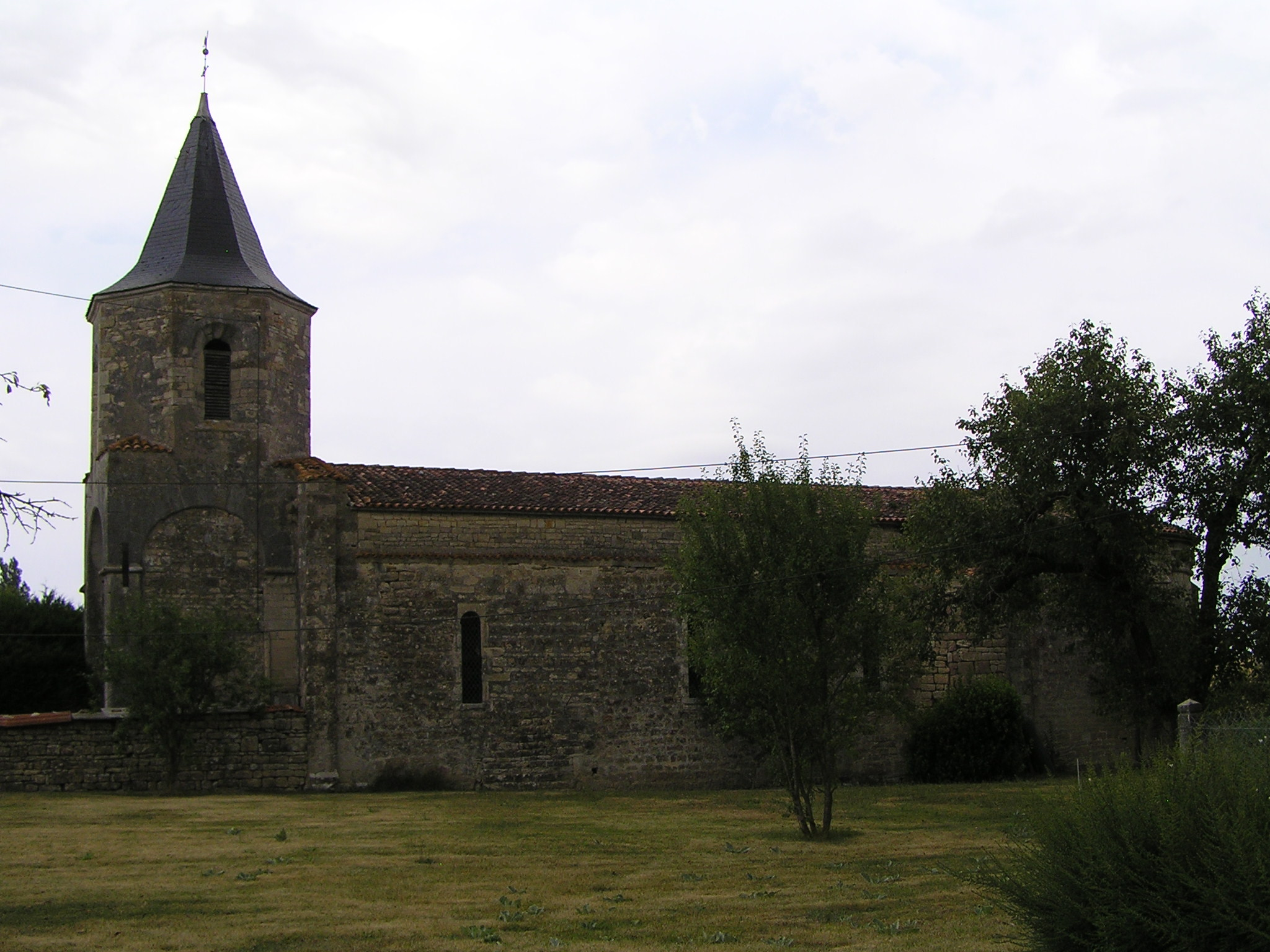 église de Souvigné